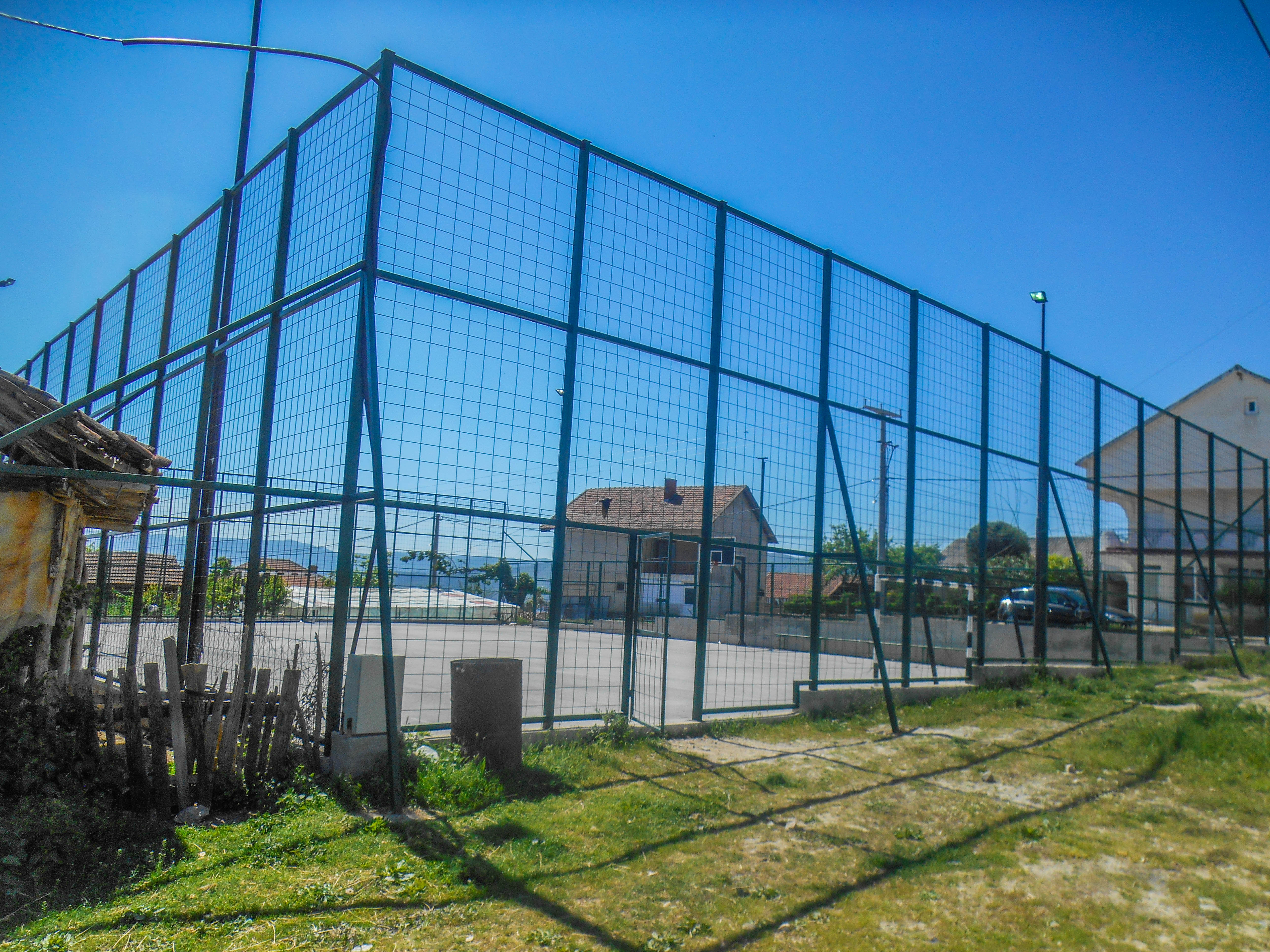 Спортско игралиште - Седларци